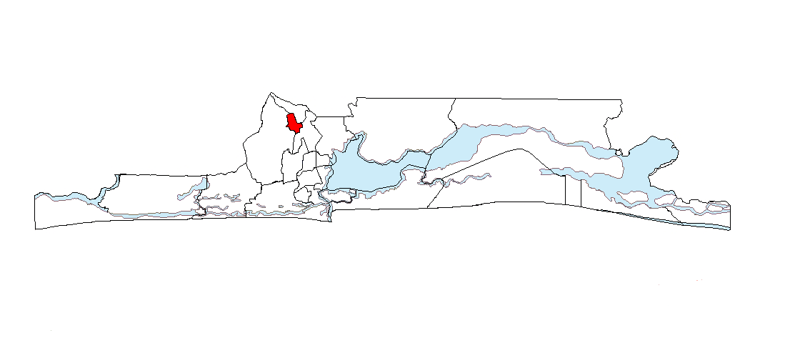 Ubicación de Agege en el Estado de Lagos